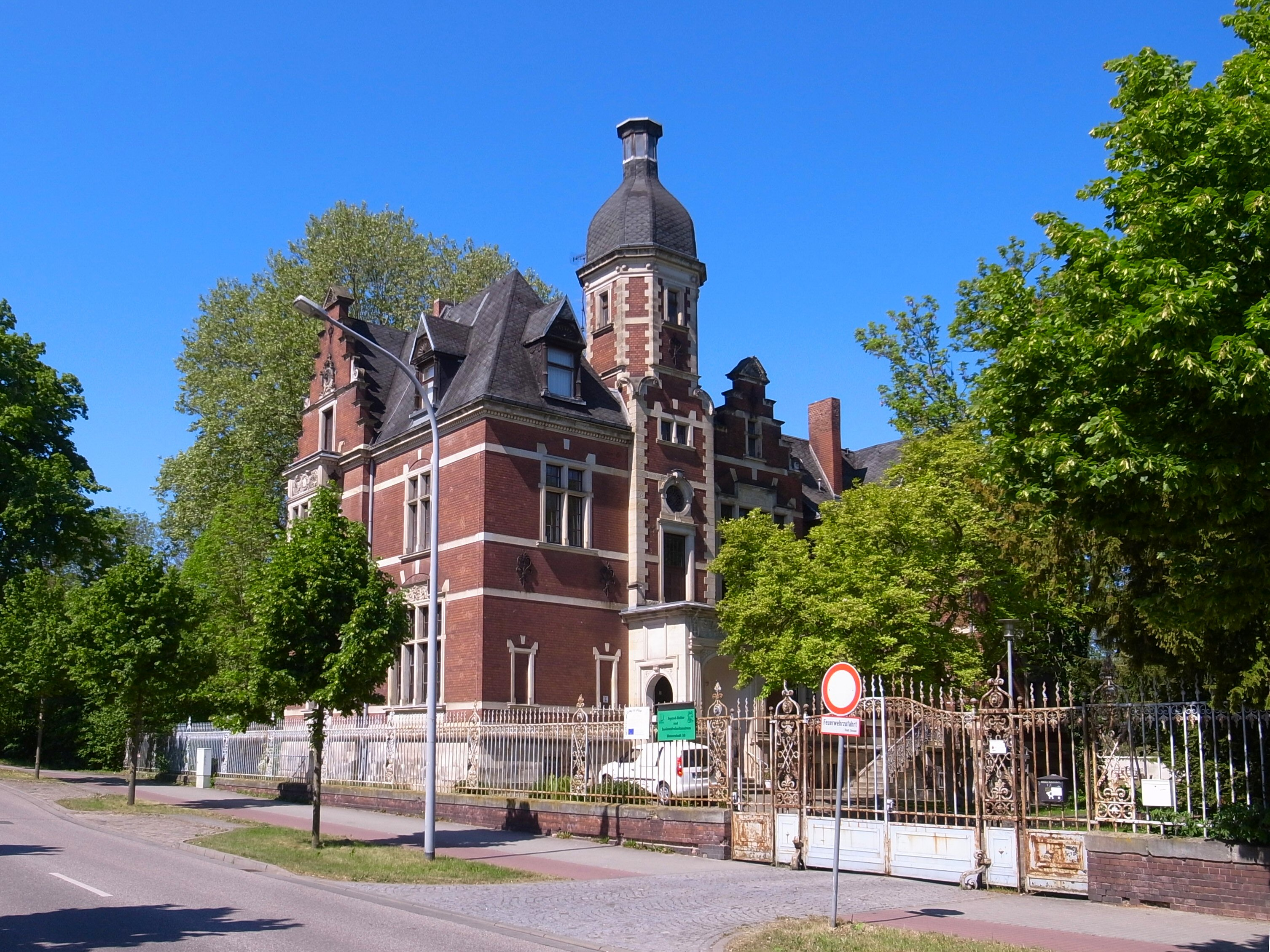 Dessau, Jugend- Kultur- und Seniorenfreizeitzentrum Krötenhof, Ehemals Villa Meinert, Hotel Krötenhof (Quelle